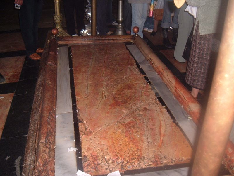 stone of annointing. אבן המשיחה בכנסיית הקבר בירושלים